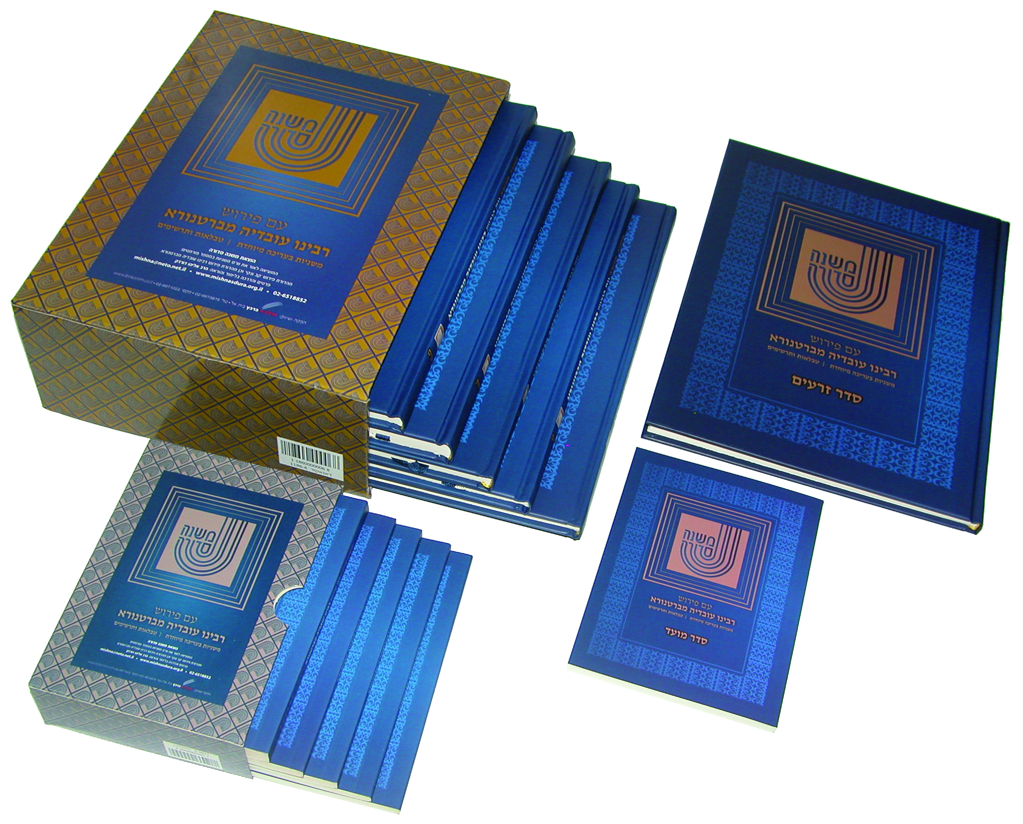 משנה סדורה מהדורת "ברטנורא" כריכה קשה ורכה